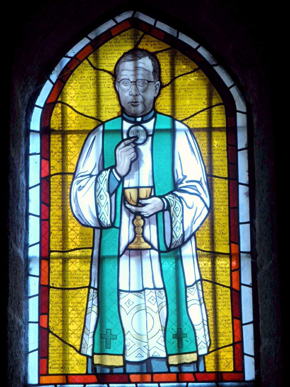 Zizur Mayor - Iglesia de San Andres